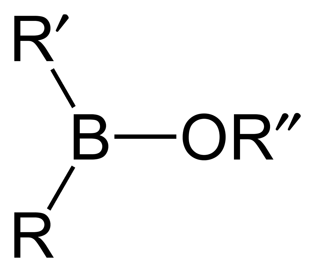 Structural formula of a general borinate ester